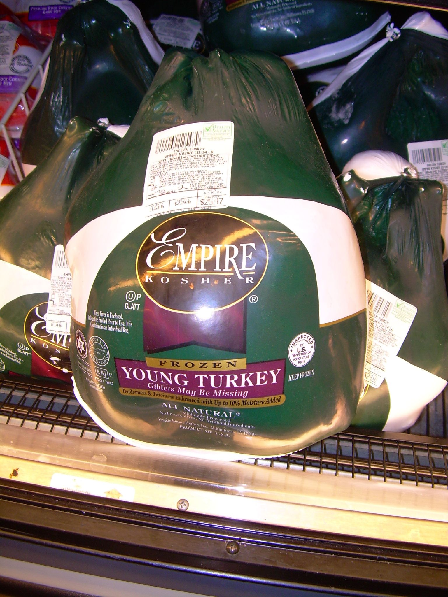 glatt kosher turkey